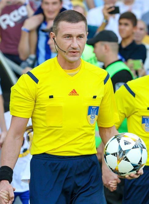 Юрій Можаровський - український футбольний арбітр